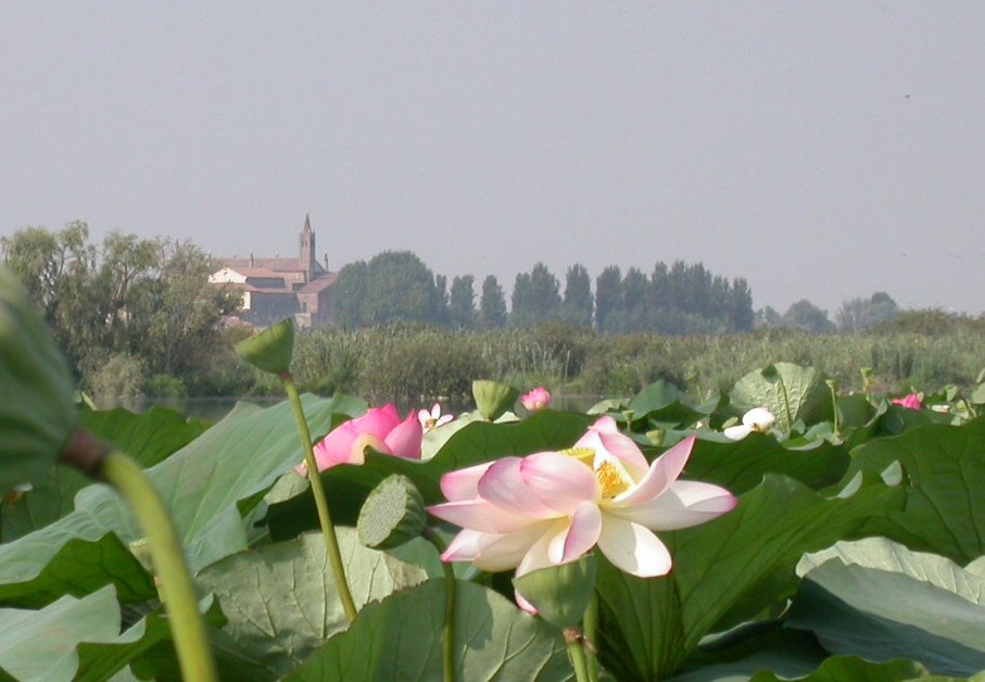 Mantova Lago Superiore fior di Loto, lavoro personale, Pietro Liberati